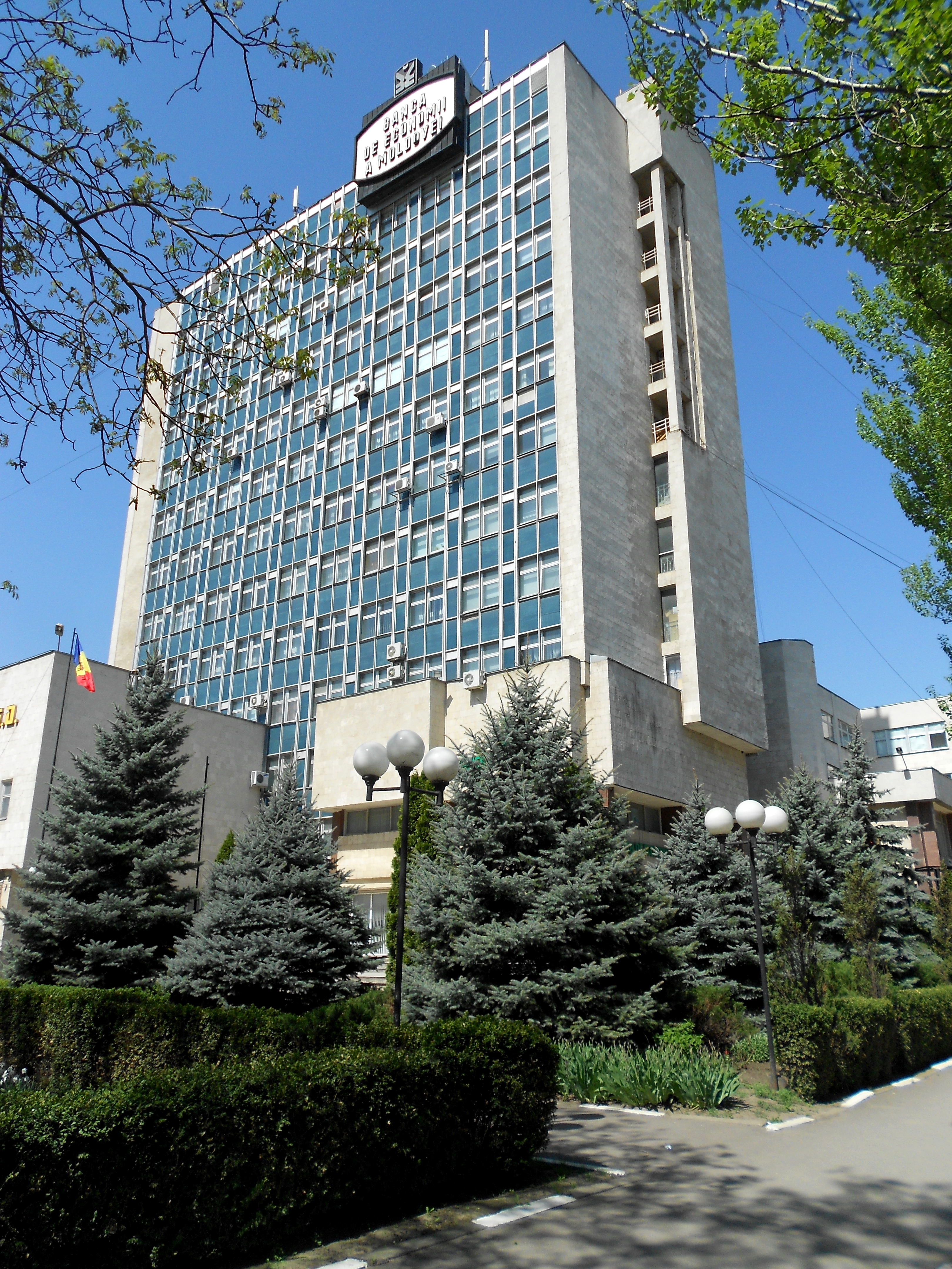 Banca de Economii din Moldova Bălți